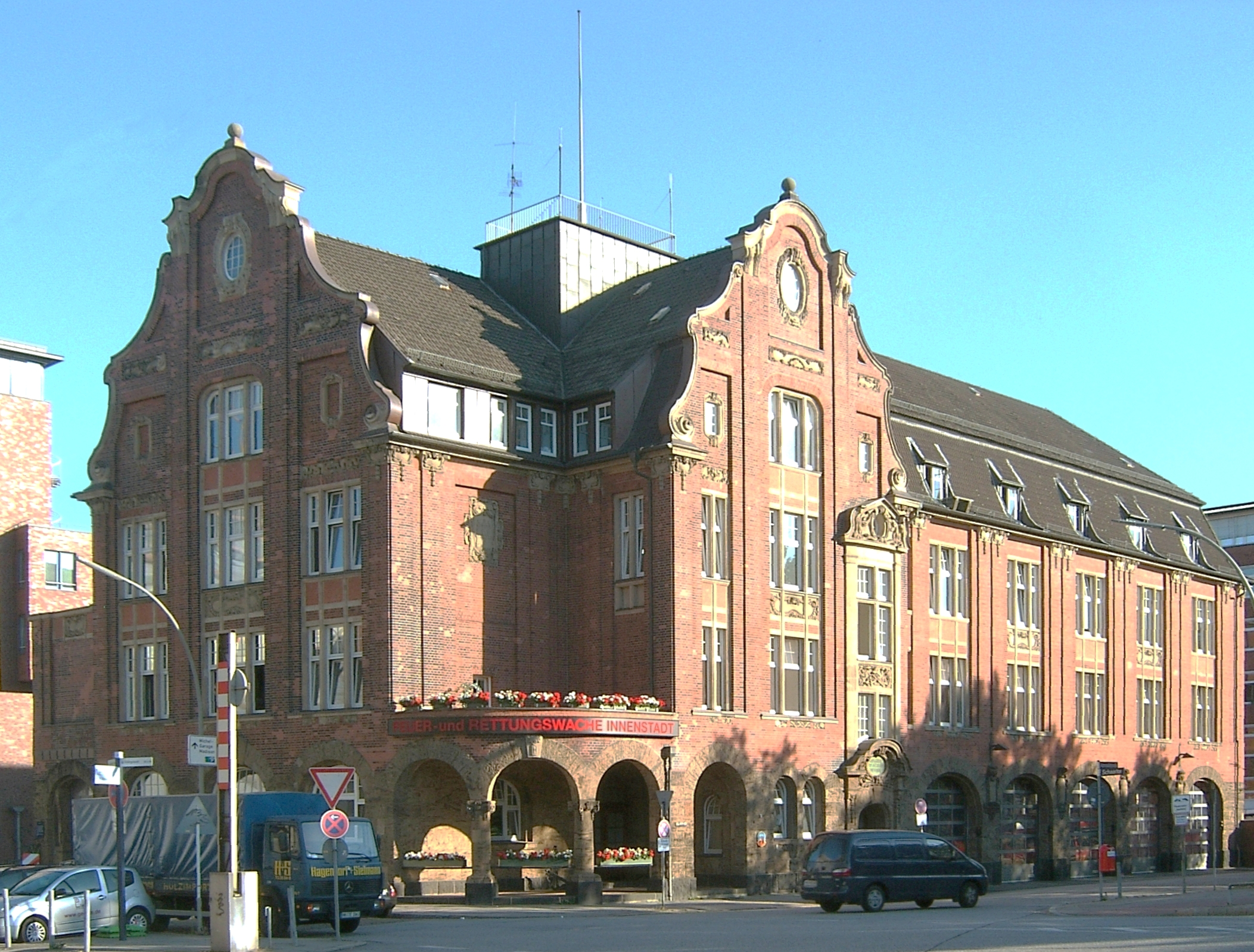 Hamburg-Neustadt, Feuerwache Admiralitätsstraße. Erbaut von Albert Erbe.